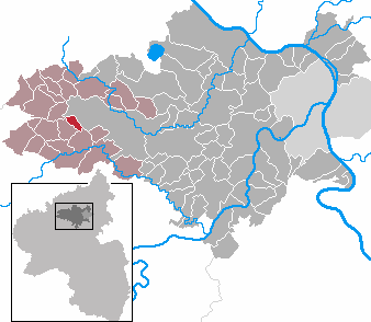 Hirten in Rhineland-Palatinate - district Mayen-Koblenz